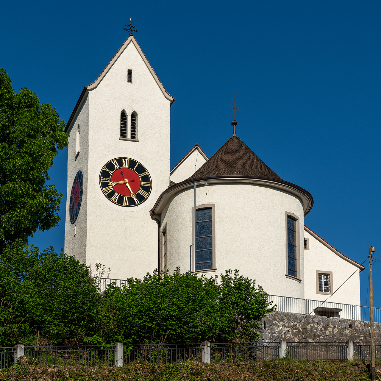 Pfarrkirche in Wölflinswil (AG)